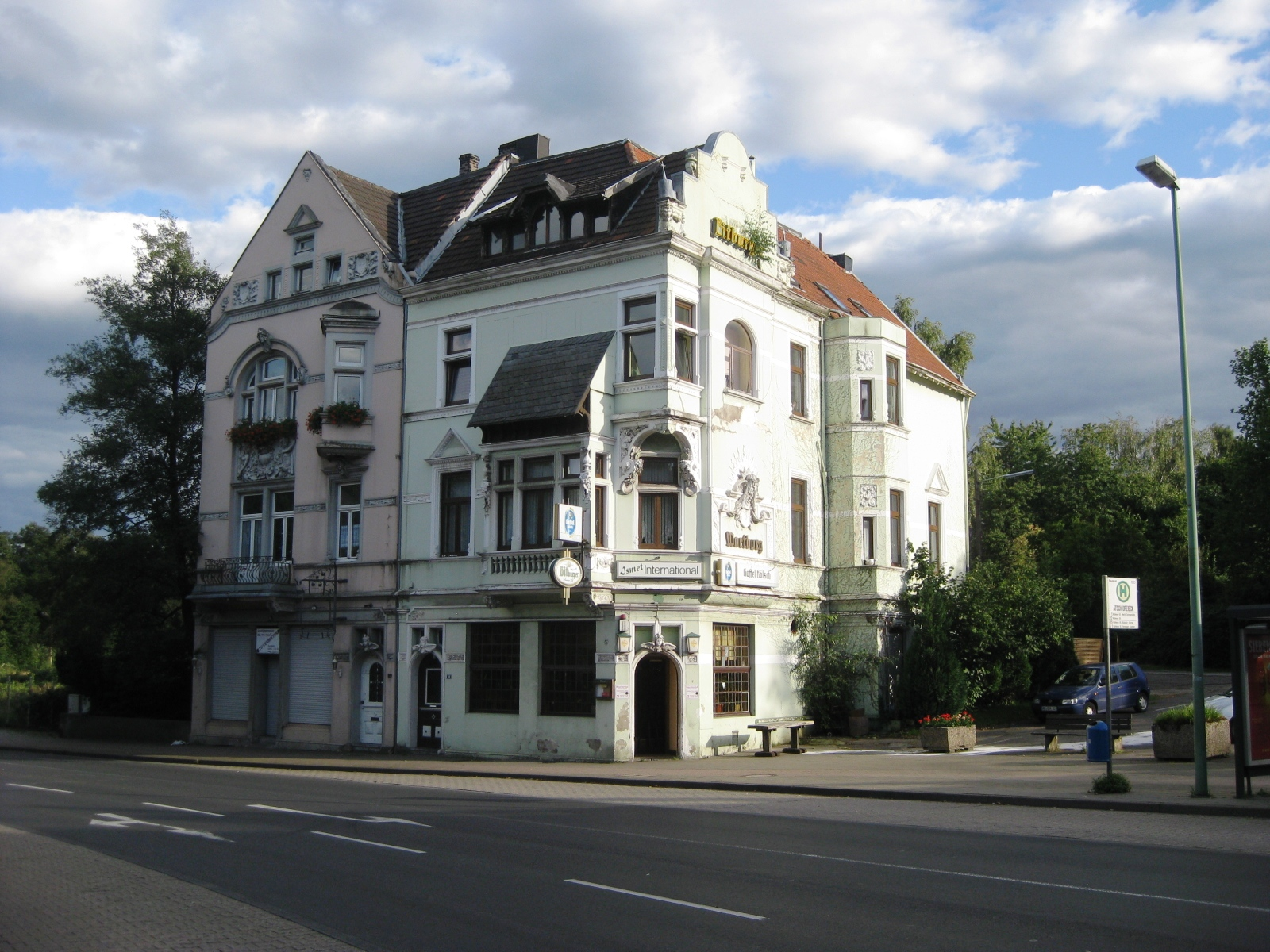 Bushaltestelle und Straßenkreuzung Atsch Dreieck im Stadtteil Atsch der Stadt Stolberg (Rhld.) in der Städteregion Aachen